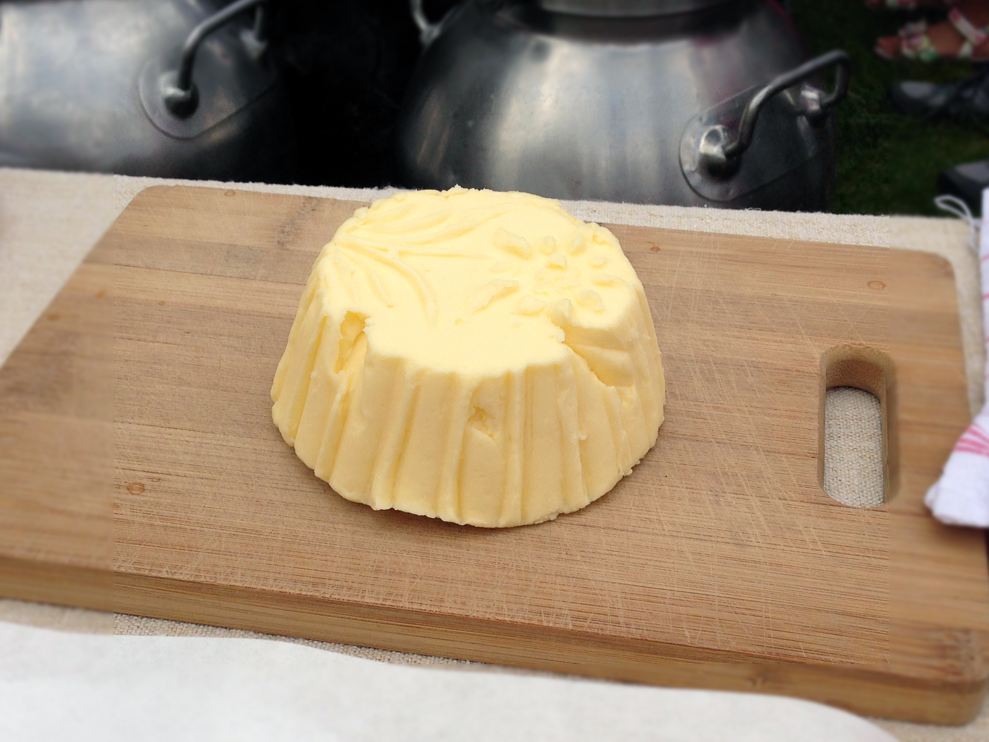 Burro prodotto artigianalmente